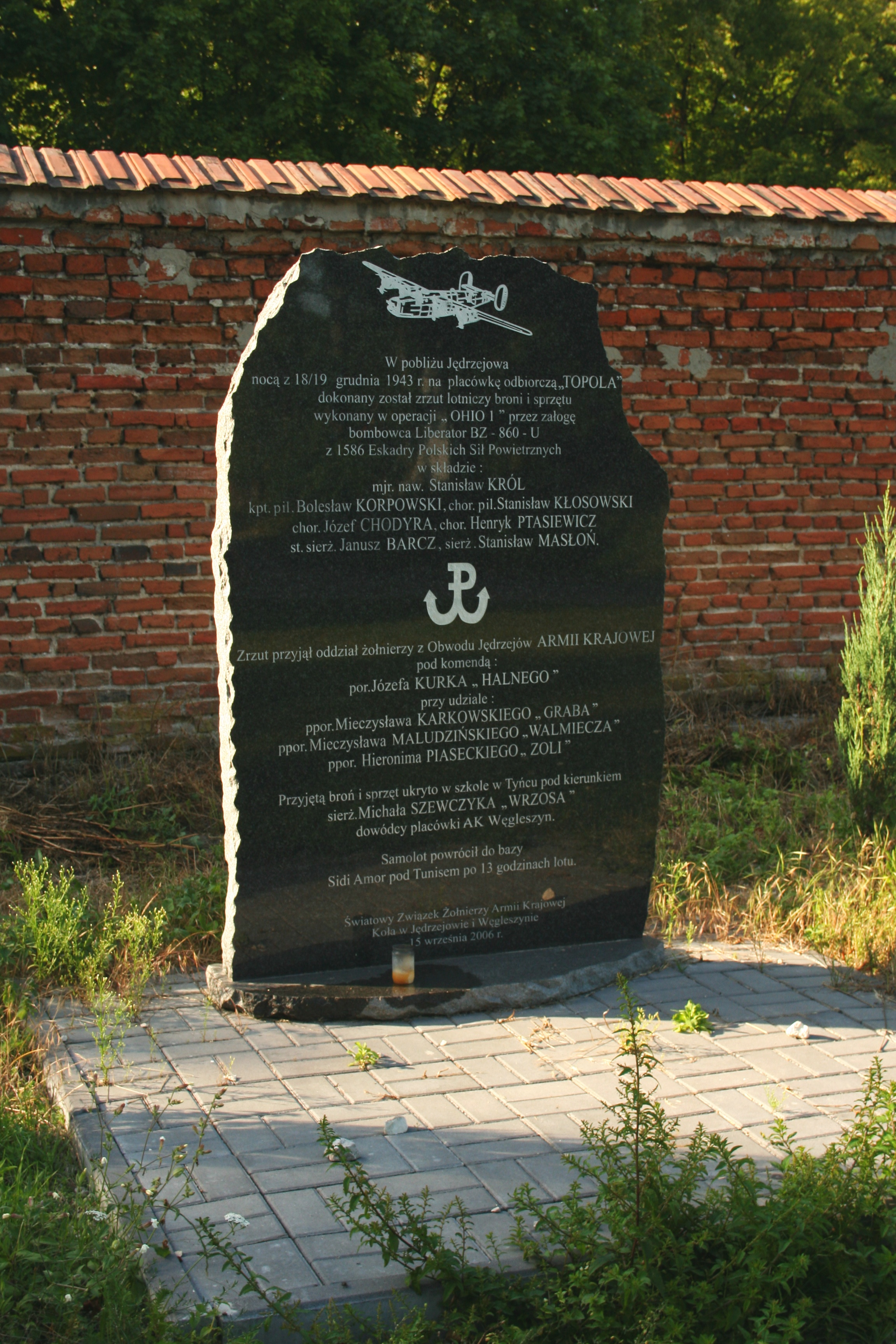 Tablica upamiętniająca udaną akcję przejęcia alianckiego zrzutu broni przez oddział żołnierzy AK. Tablica znajduje się nieopodal murów otaczających klasztor o.o. Cystersów w Jędrzejowie.